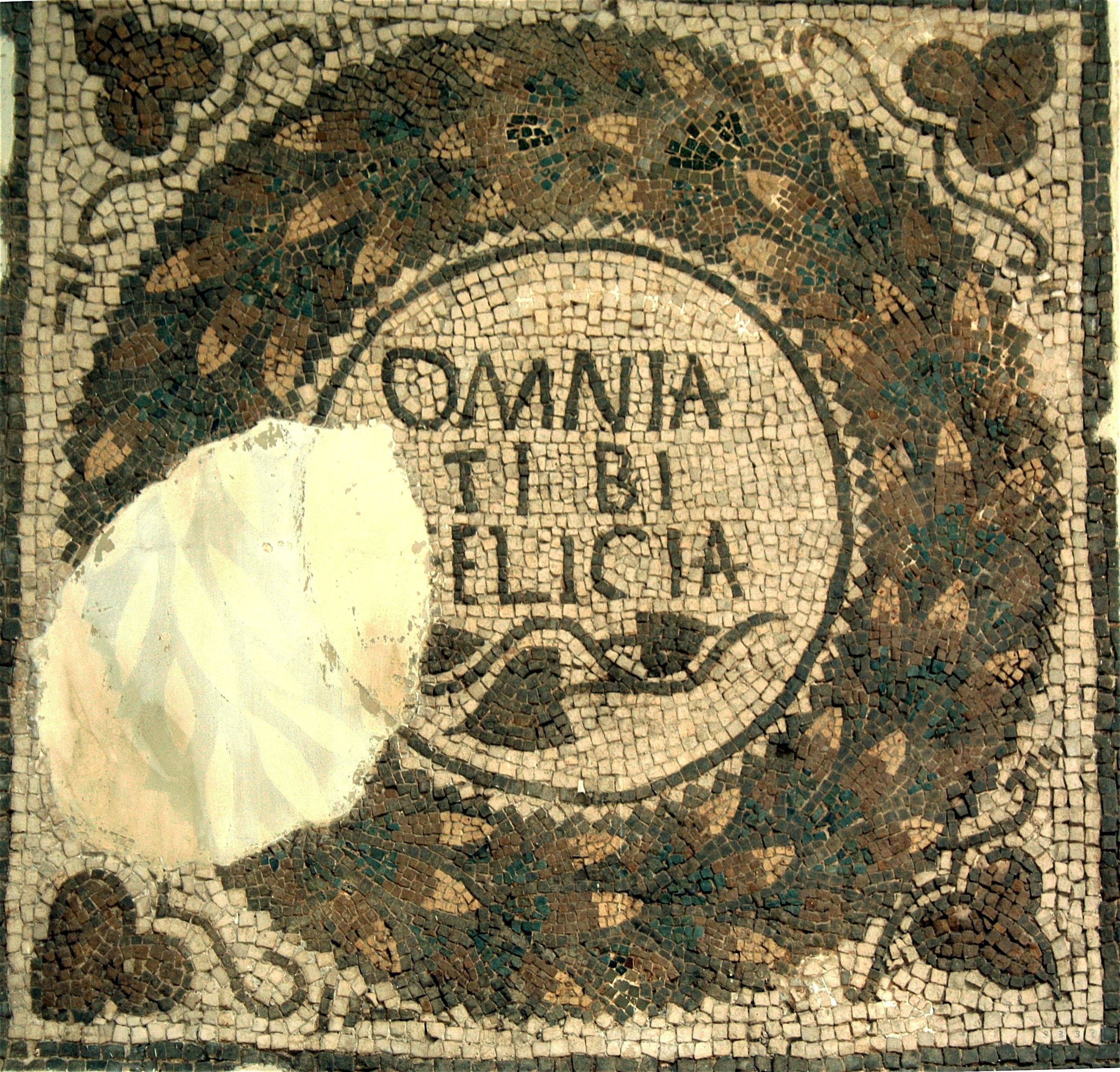 Mosaïque de la maison d'"Omnia Tibi Felicia", au musée national du Bardo. Le médaillon de mosaïque est marqué par l'inscription "Omnia tibi felicia" (« Puisses-tu te réjouir de tout»); il provient de Dougga et date du IVe siècle.